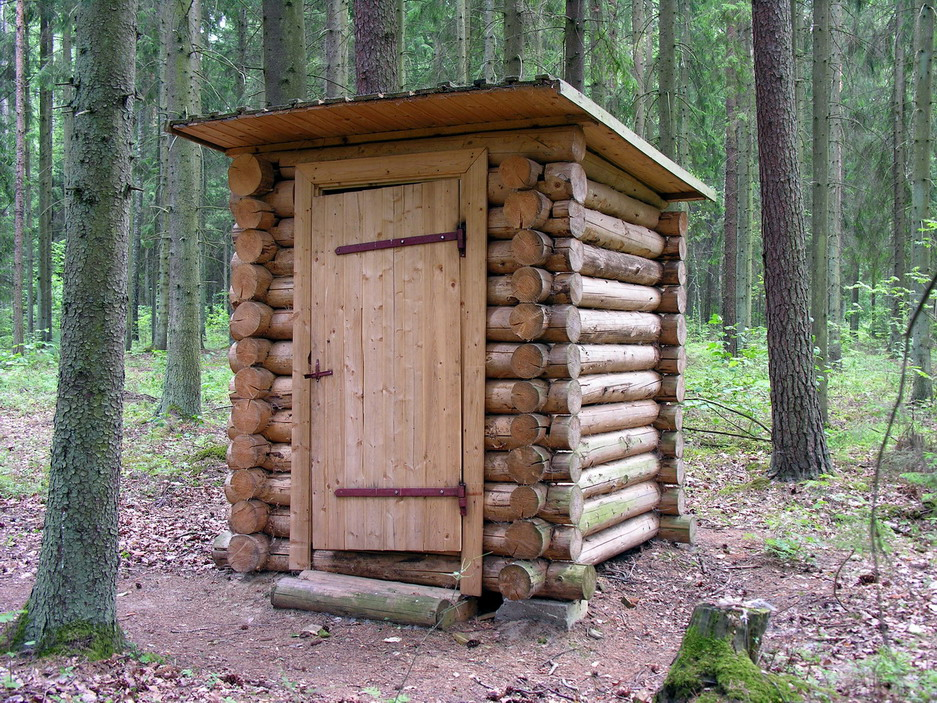 Išvietė Foto: Algirdas, 2006 m. liepos 12 d., Lietuva